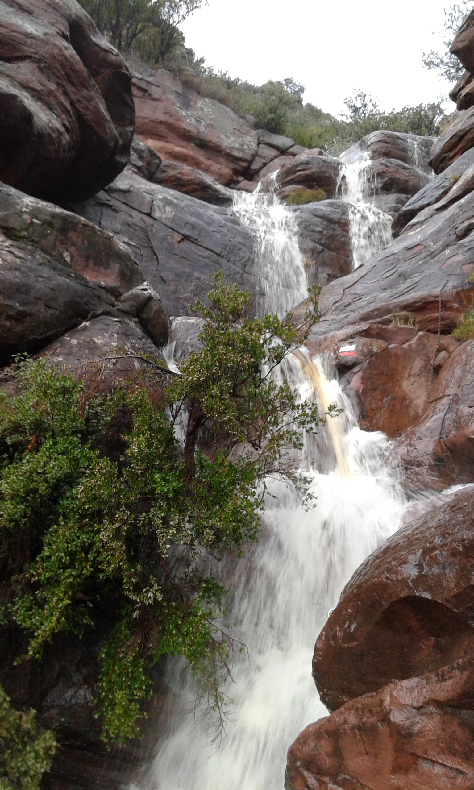 GR 10. Canal del Garbí. Serra Calderona després de pluges fortes